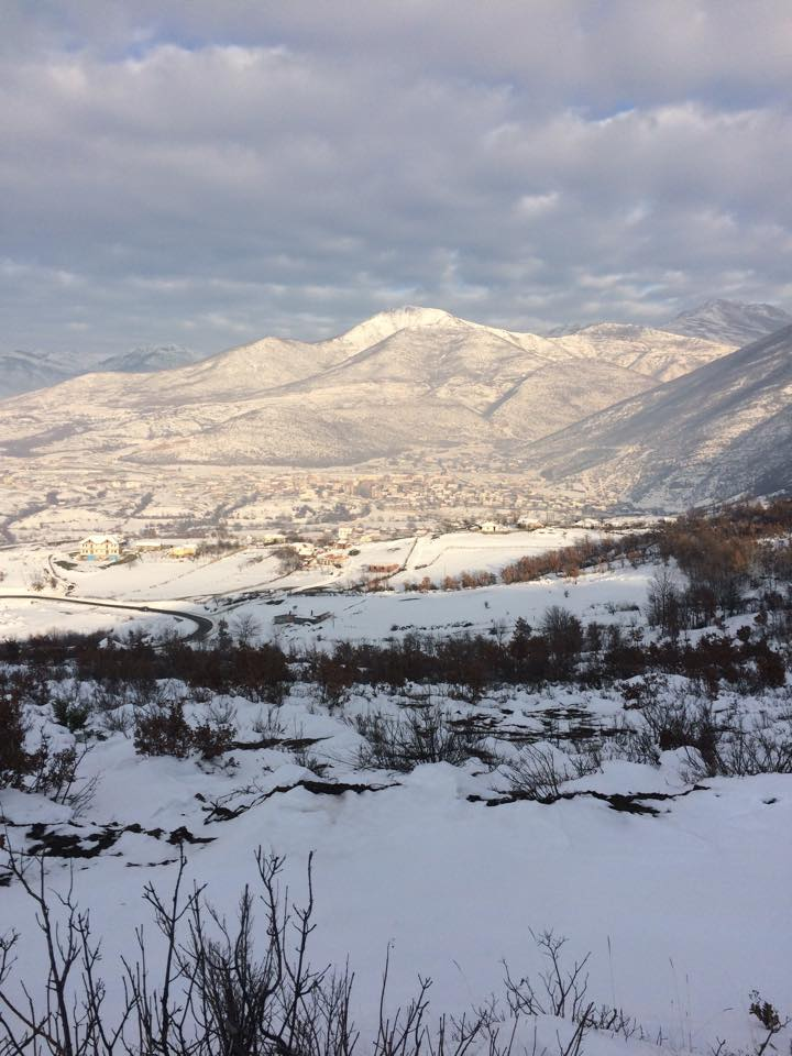 Pamje te qytetit te Krumes mbuluar nga debora